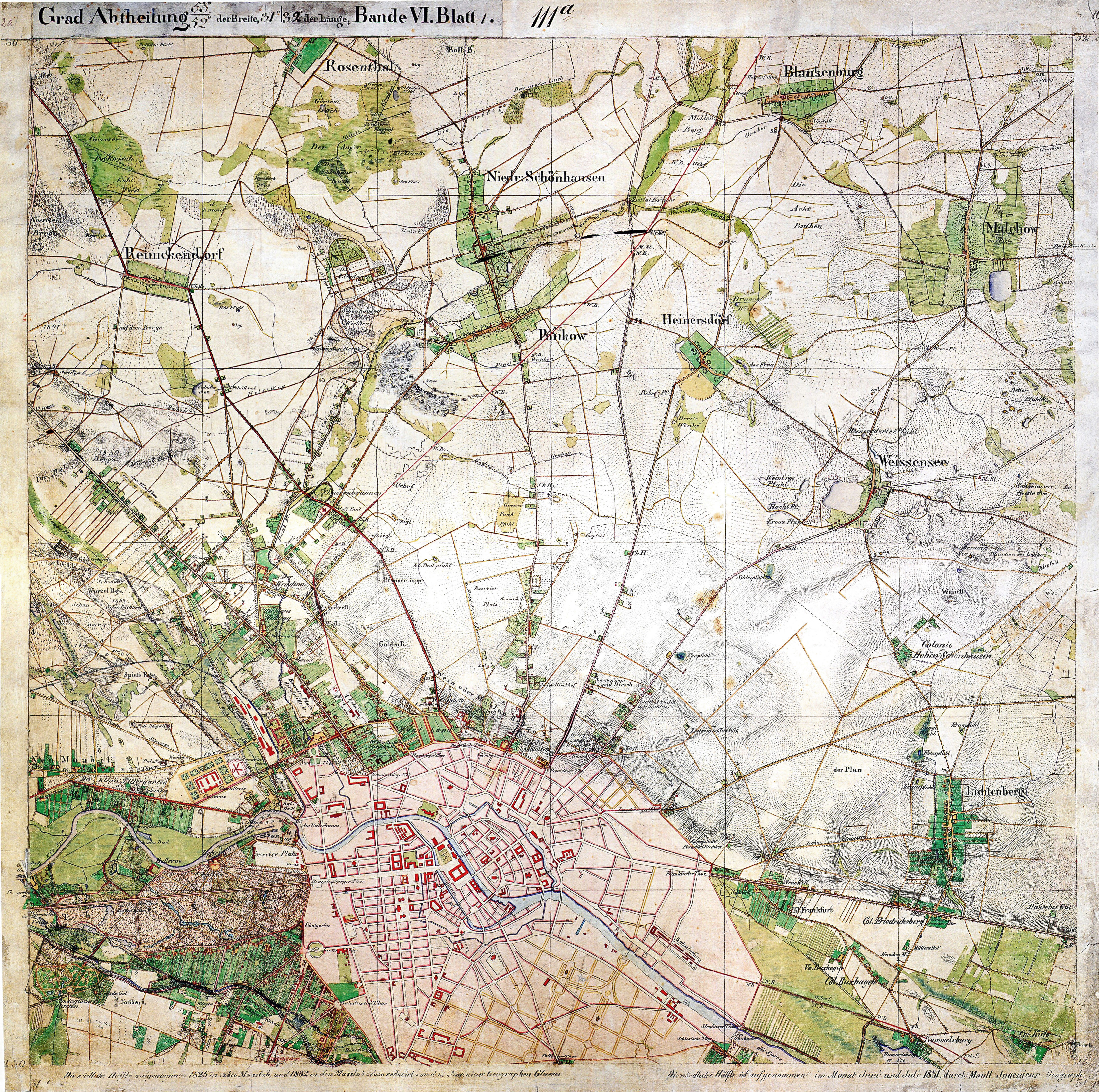 "Grad Abtheilung 53°/52° der Breite, 31°/32° der Länge; Bande VI. Blatt 1". Unter dem Blatt steht: "Die südliche Hälfte aufgenommen 1825 in 1/12500 Masstab, und 1832 in den Masstab 1/25000 reduciert von dem Ingenieur Geographen: Glaeser" und "Die nördliche Hälfte ist aufgenommen in Monat Juni und Juli 1831, durch Maull Ingenieur Geograph."